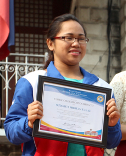 Hidilyn Diaz